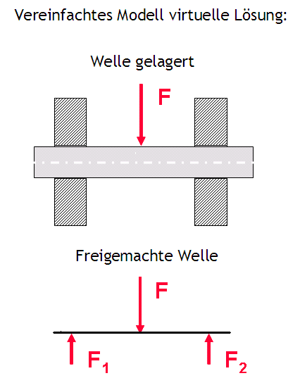 Welle von der Umgebung virtuell gelöst